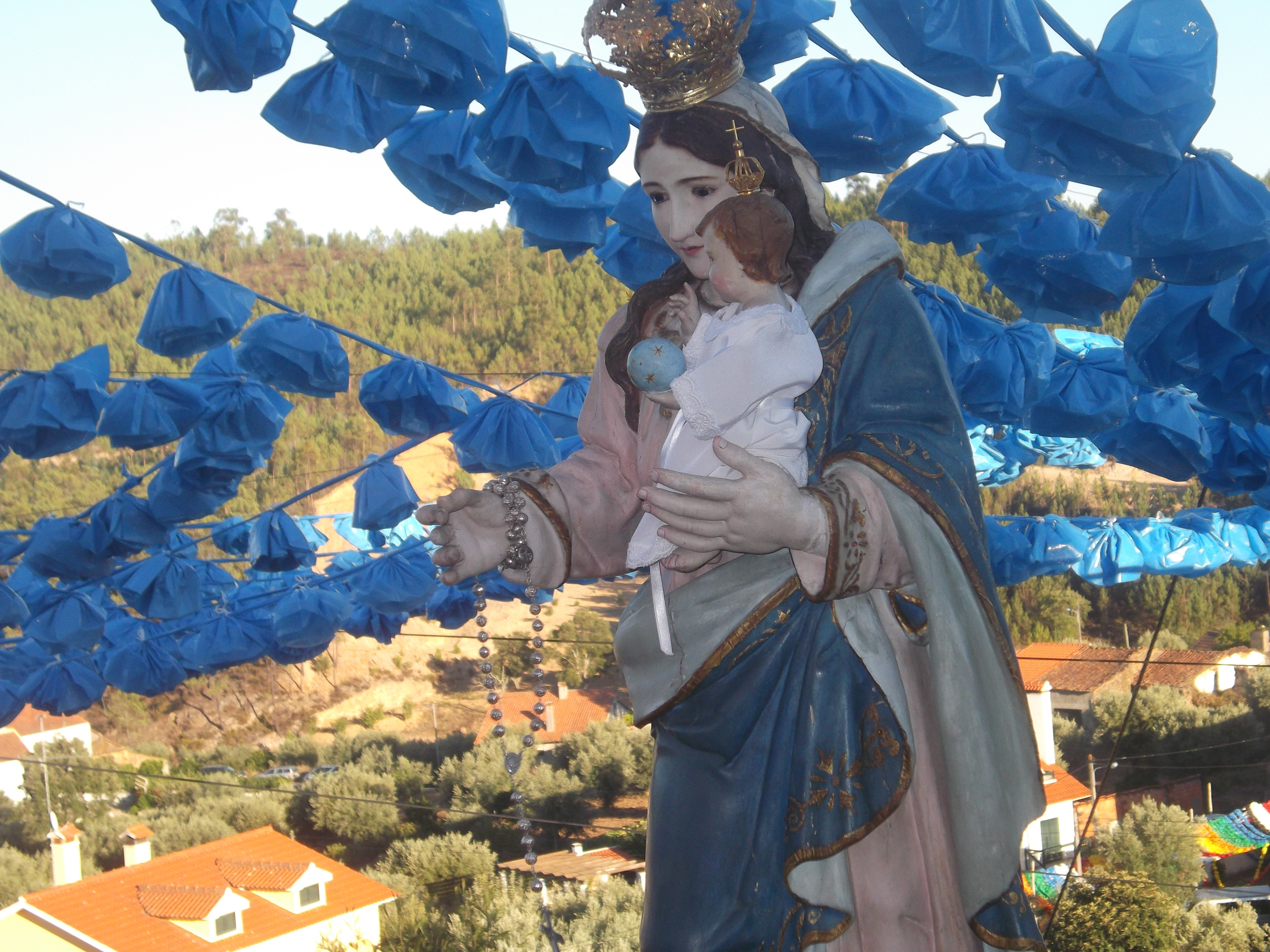 Ninguém fica indiferente à passagem do andor da padroeira, a Senhora da Saúde, que é transportado por dezasseis pessoas, simultaneamente.... Toda a gente fica comovida...